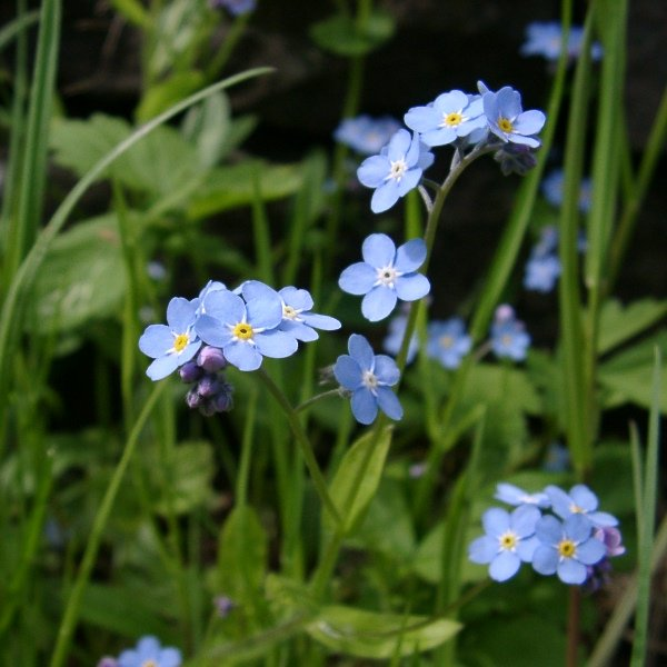 Foto på blomma Förgätmigej Fotograf: Daniel Ryde Plats: Hågadalen, Uppsala Tid: 2001-06-03, kl. 11:35 Licens